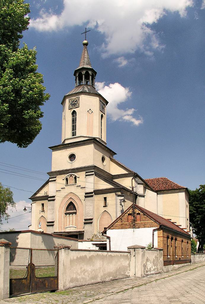 Pyskowice - kościół parafialny pw. św. Mikołaja (zabytek nr A/289/60 z 7.03.1960)